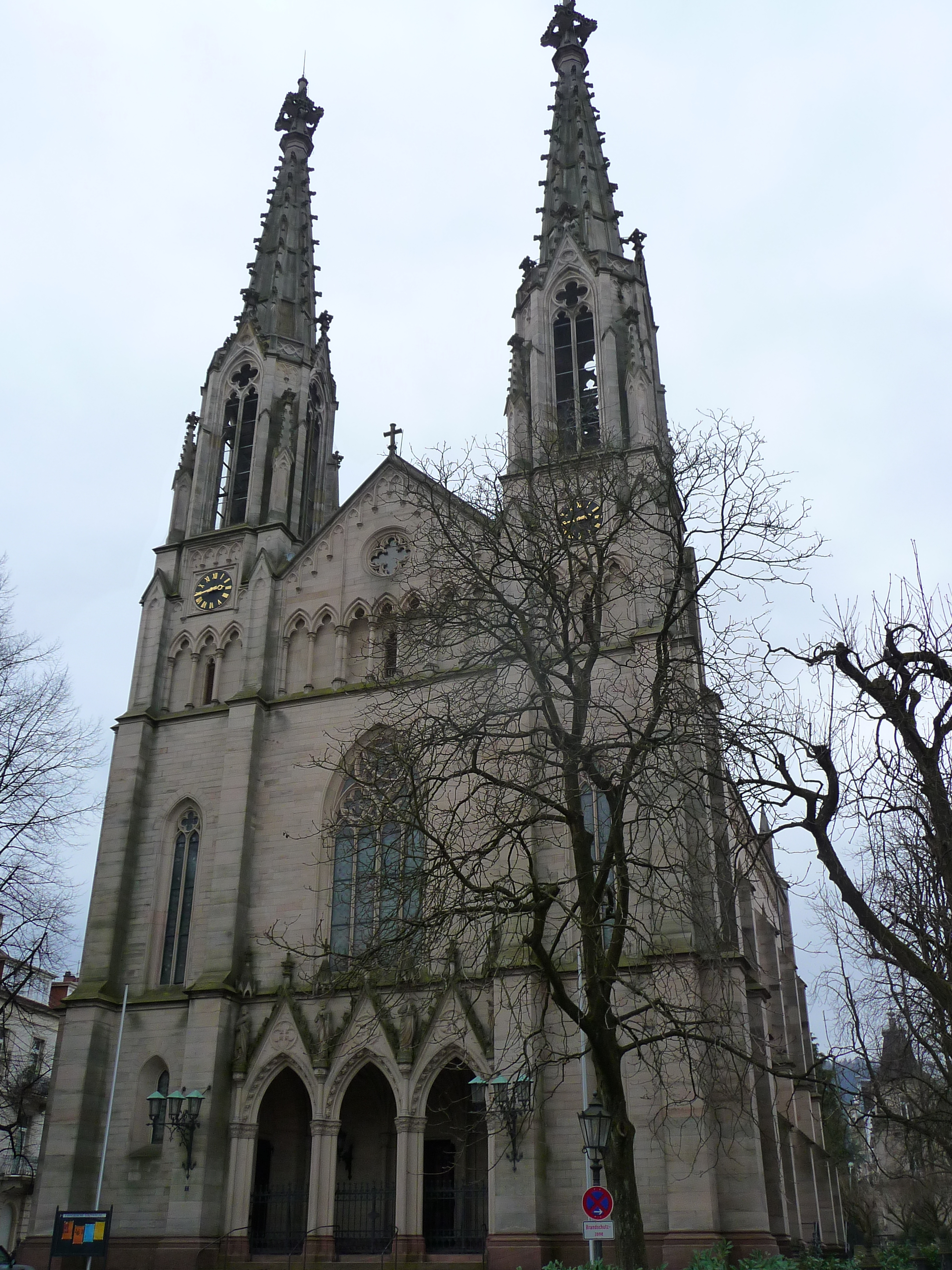 Evangelische Stadtkirche in Baden-Baden (Baden-Württemberg, Deutschland)